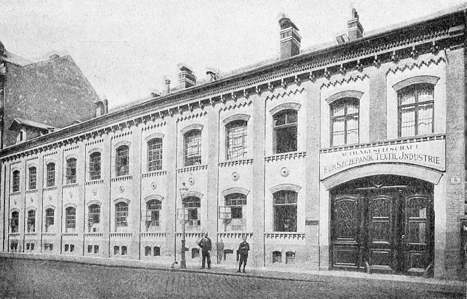 Pracownia Jana Szczepanika w Wiedniu, Patroniarnia Gal. Tow. Akc. dla tkactwa